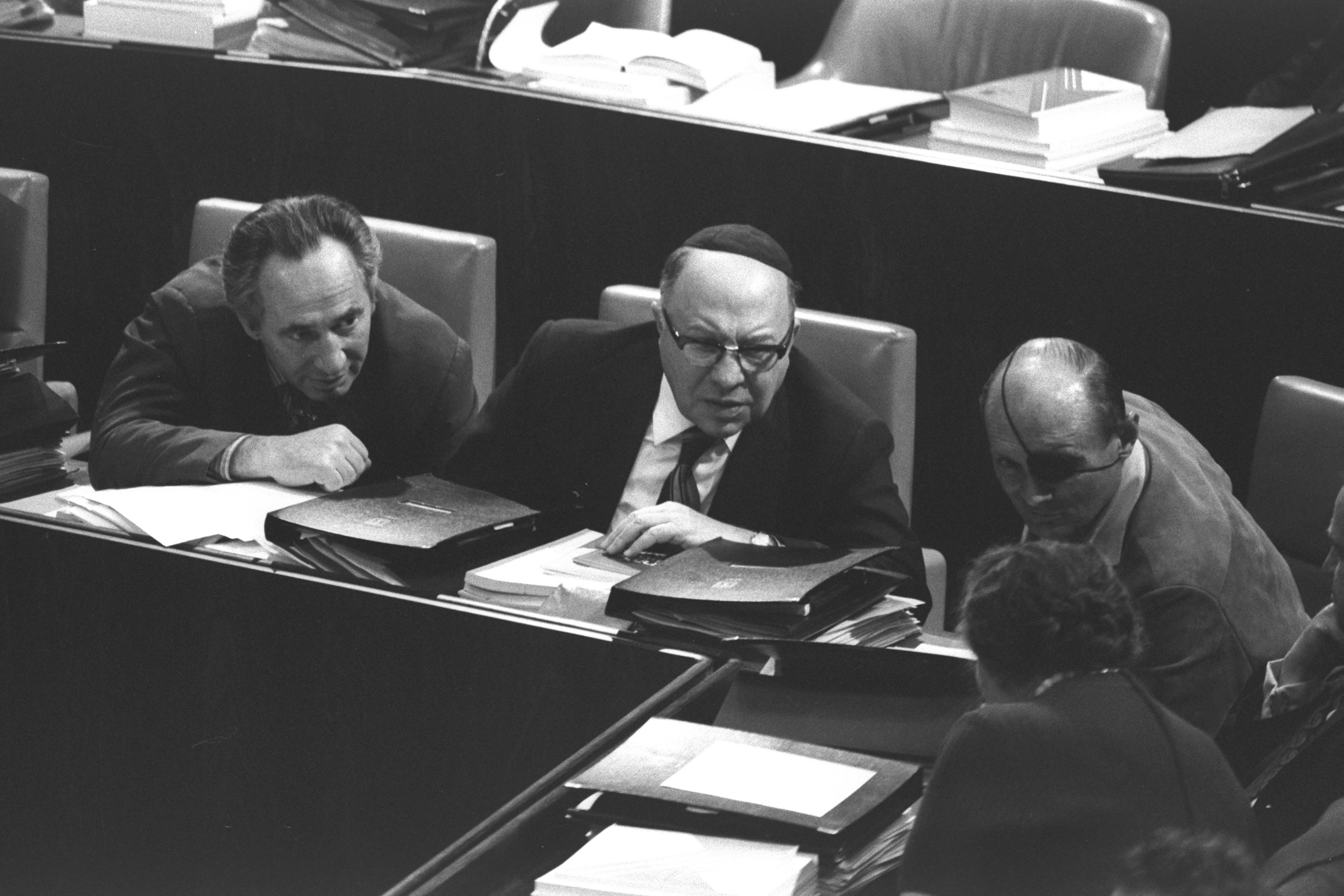 Prime Minister Golda Meir states a point of view to (left to right) Ministers Shimon Peres, Yosef Burg and Moshe Dayan. שיחה בין ראש הממשלה גולדה מאיר, שר הביטחון משה דיין, השר יוסף בורג והשר שמעון פרס, במליאת הכנסת בירושלים. Photo: HERMAN CHANANIA, 04/10/1973